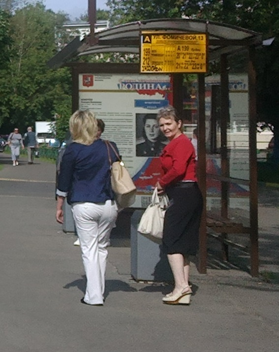 Остановка на улице Фомичёвой в Москве